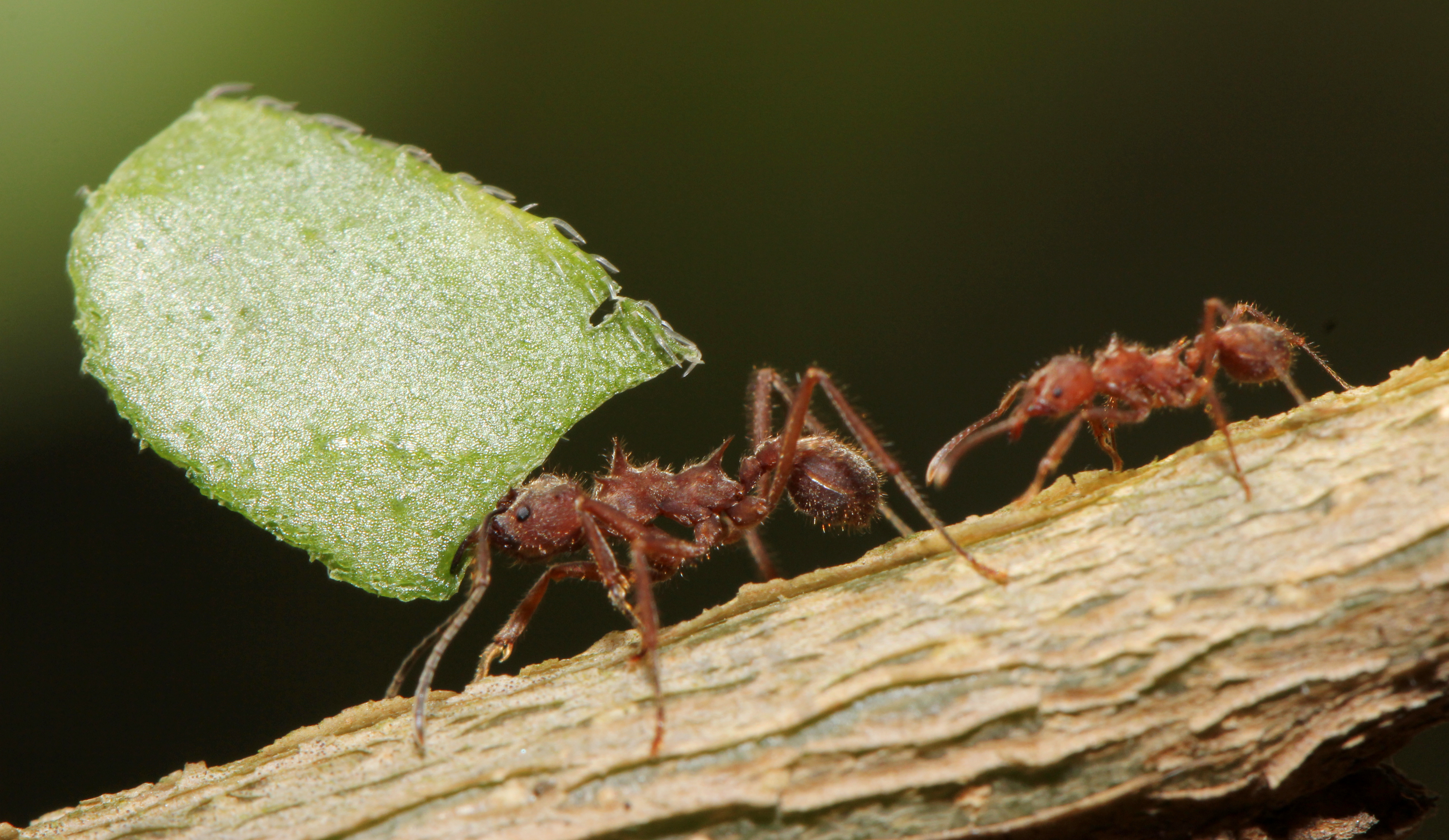 Formigas trabalhando